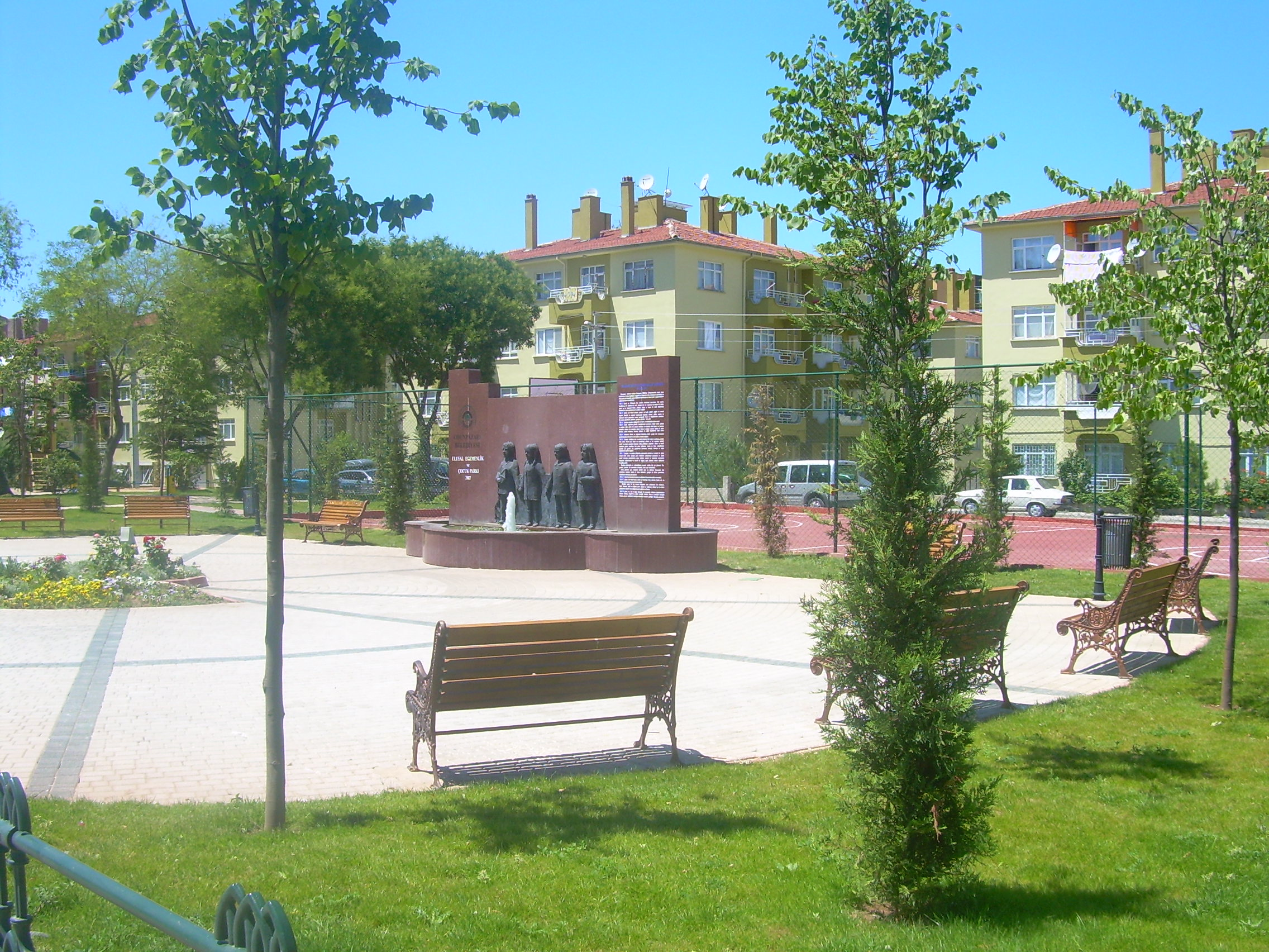 Gökmeydan mahallesi Göktuğ Özkan parkı.